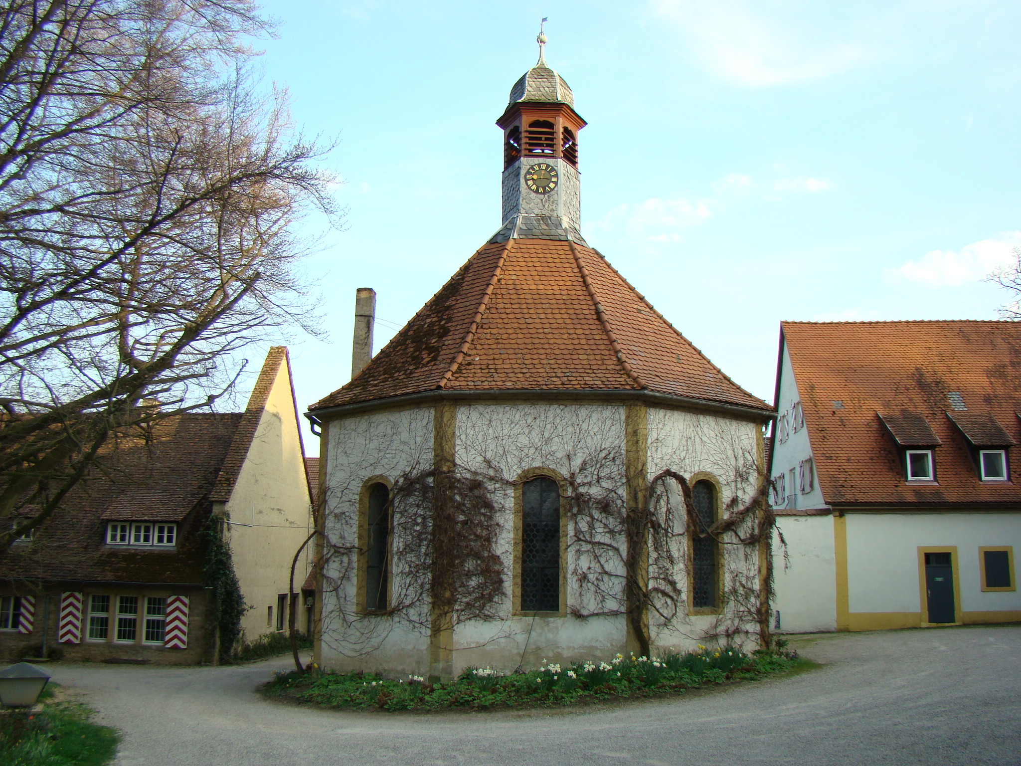 Schlosskapelle Heinsheim